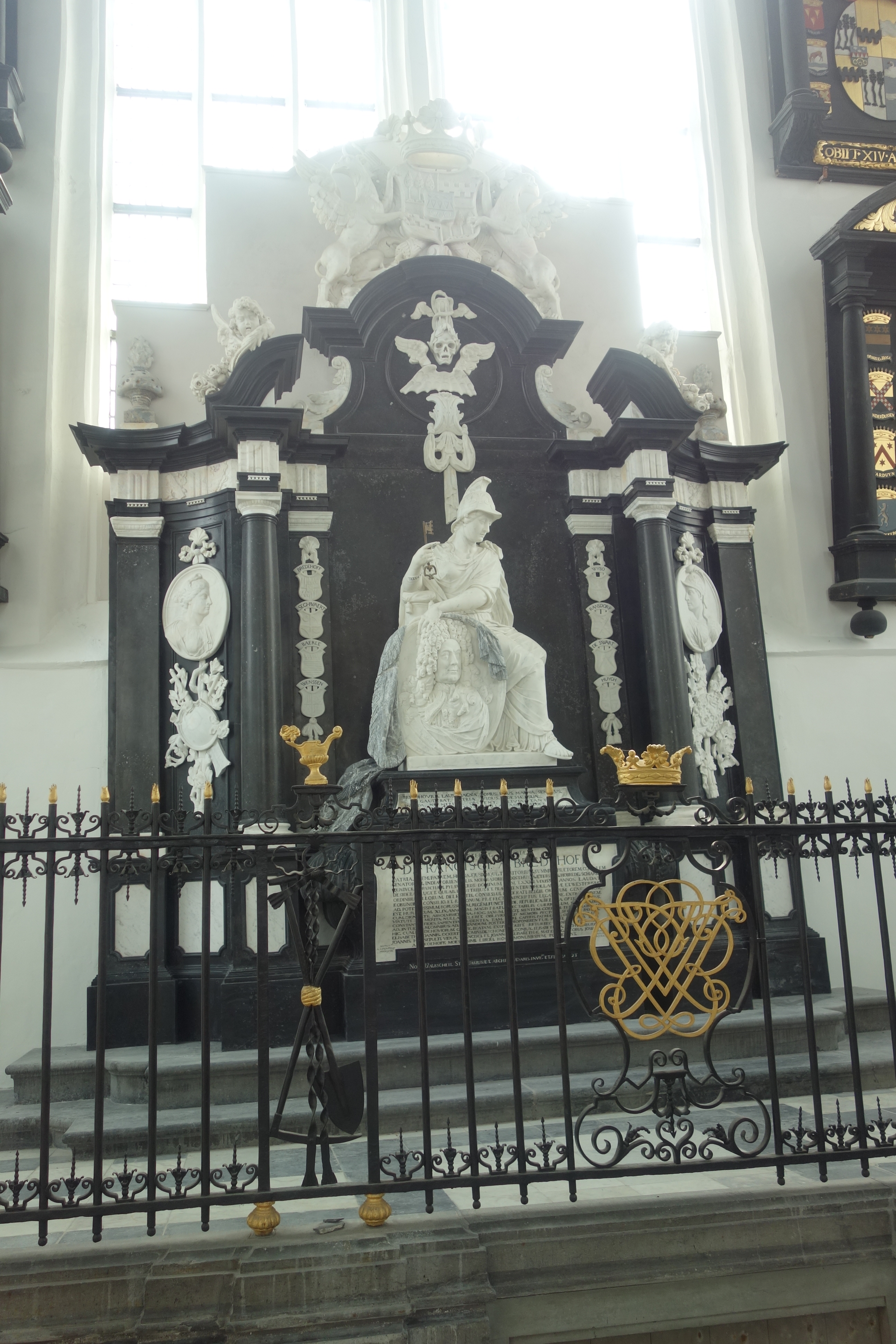 Het graf voor François van Bredehoff is gebeeldhouwd door Jan Pieter van Baurscheidt (sr), mogelijk hebben zowel senior als junior aan het praalgraf gewerkt. Het is gehouwen uit wit en zwart marmer.